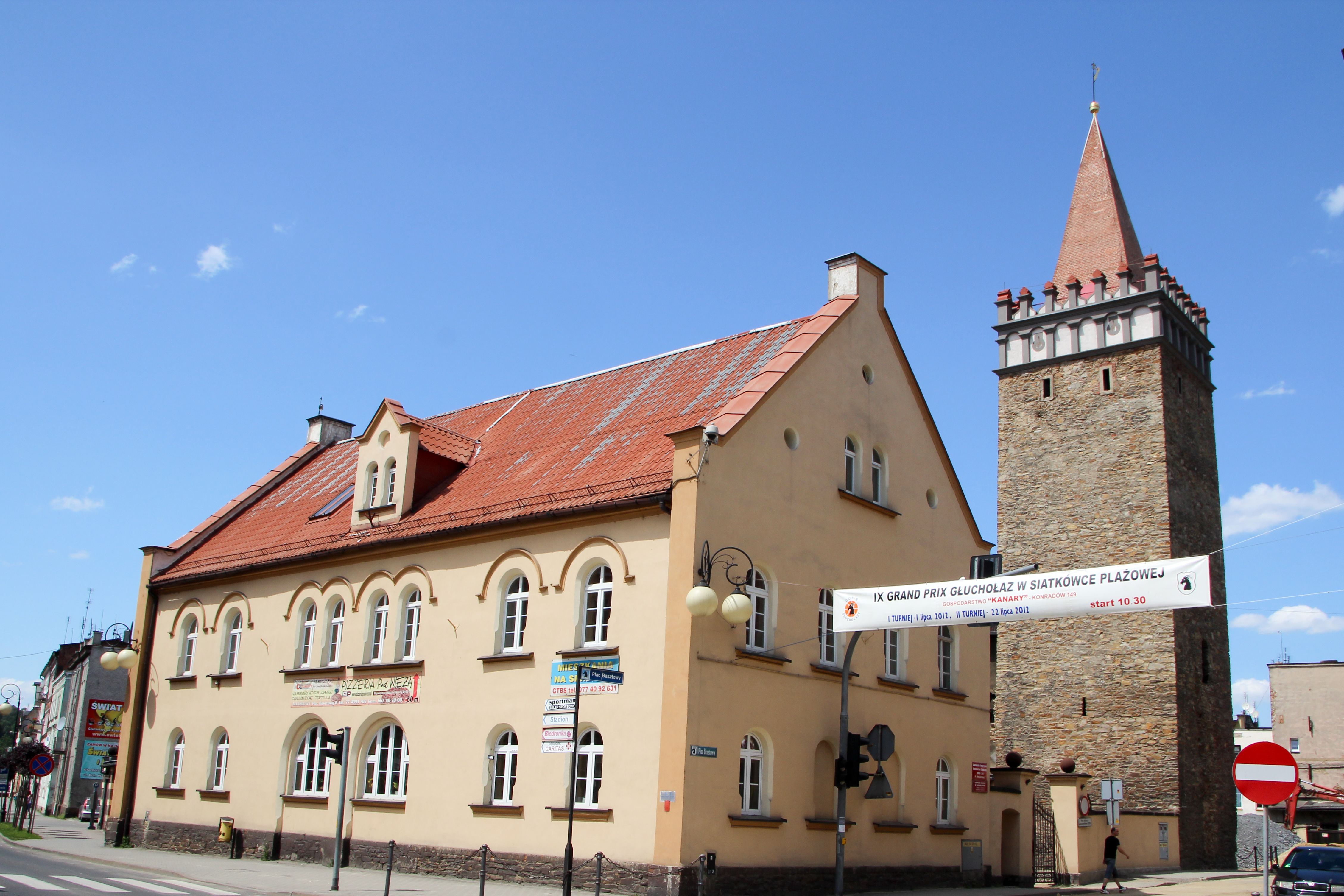 Głuchołazy - miasto w Polsce w województwie opolskim, w powiecie nyskim.